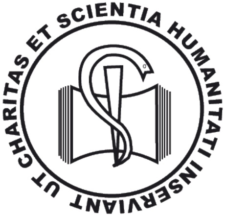 Escudo Facultad de Medicina, UASLP.